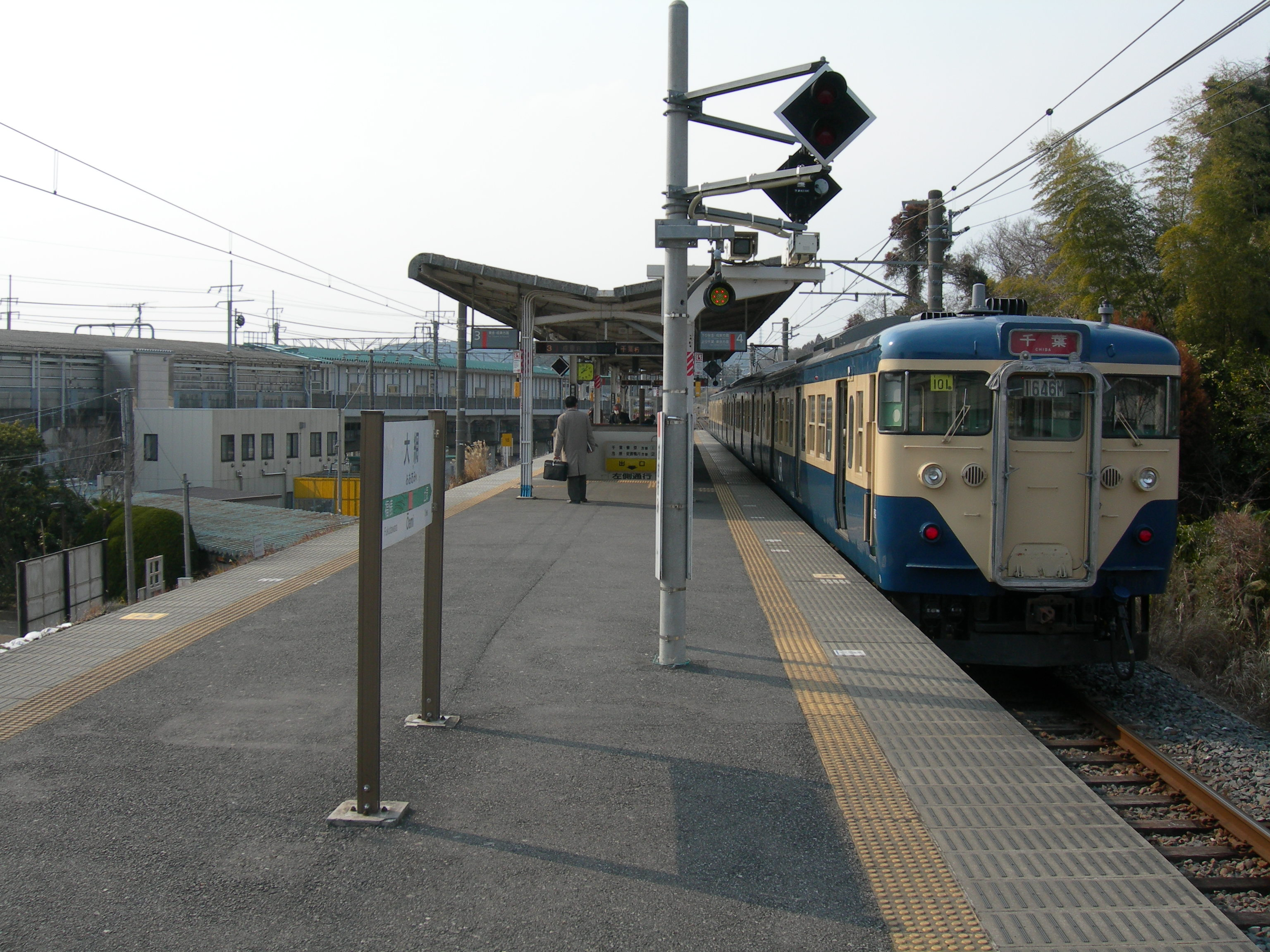 大網駅プラットホーム